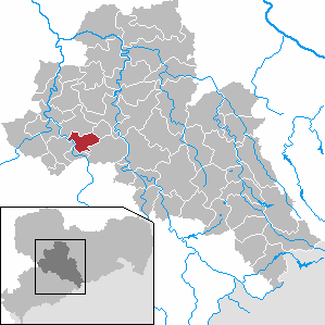 Claußnitz in Saxony - district Mittelsachsen